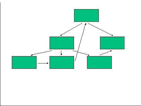 schéma du modèle réseau auteur : moi-même